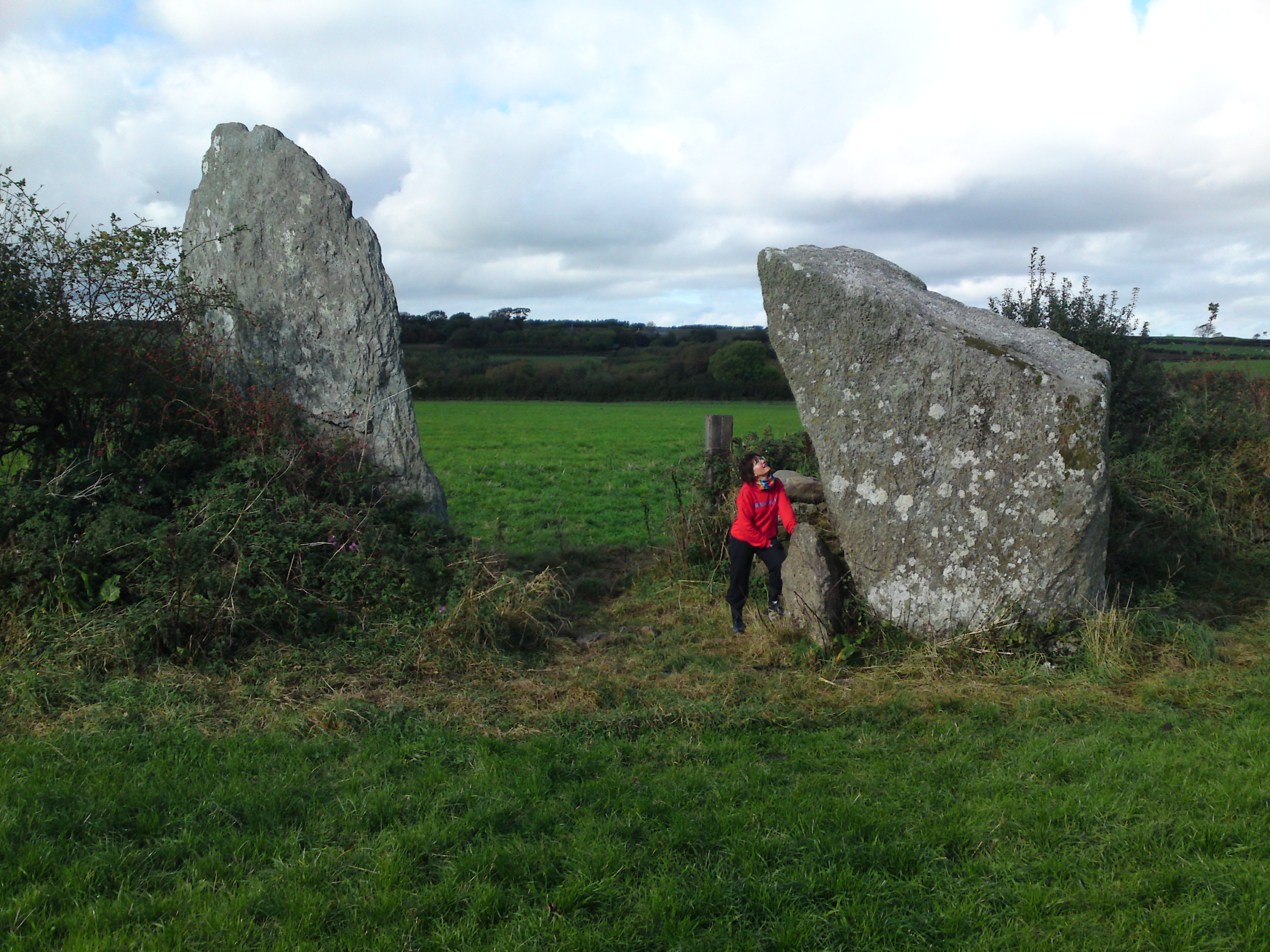 Bryn Gwyn stones with small adult